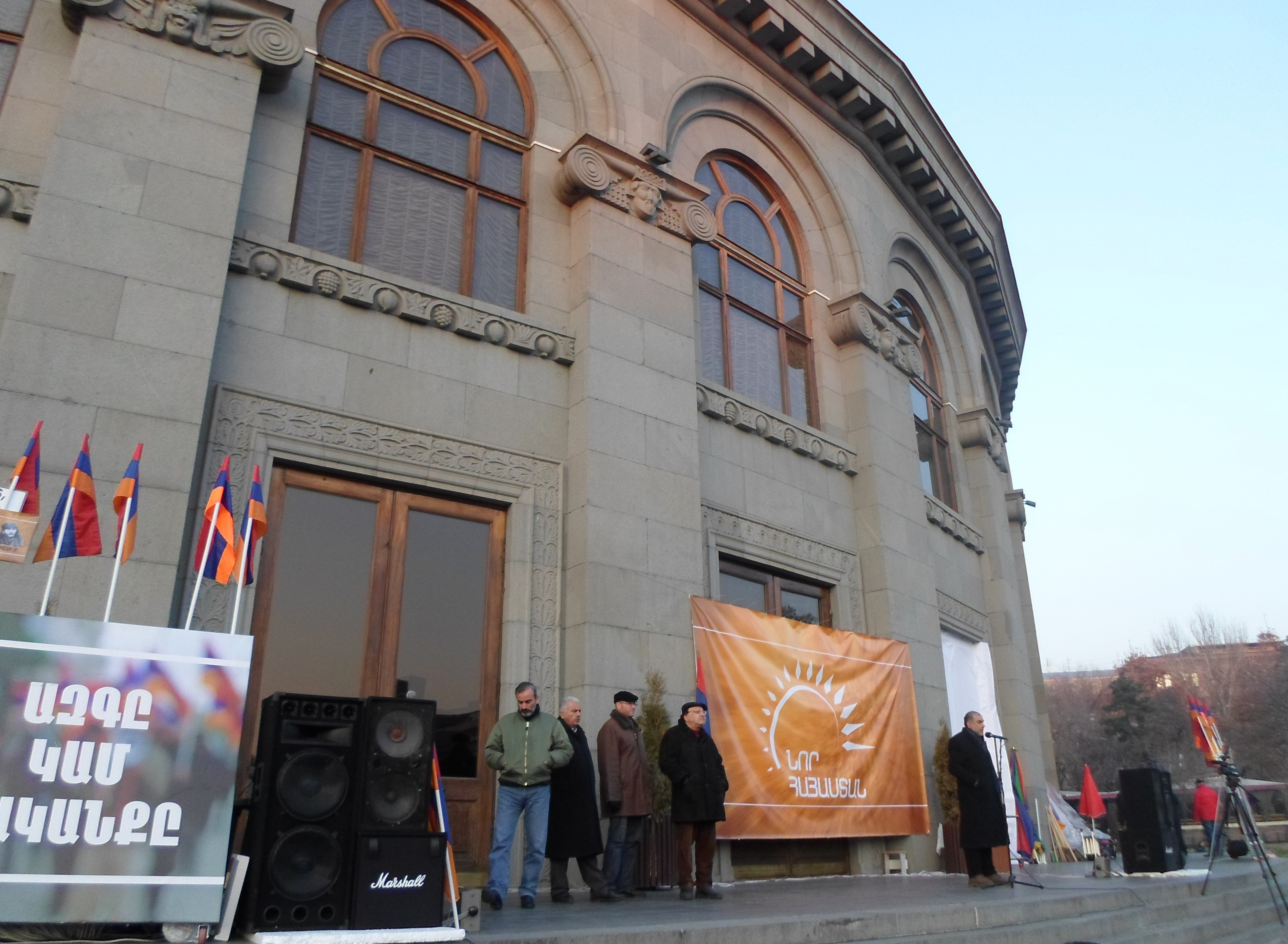 Նոր Հայաստան շարժման հավաքը Ազատության հրապարակում